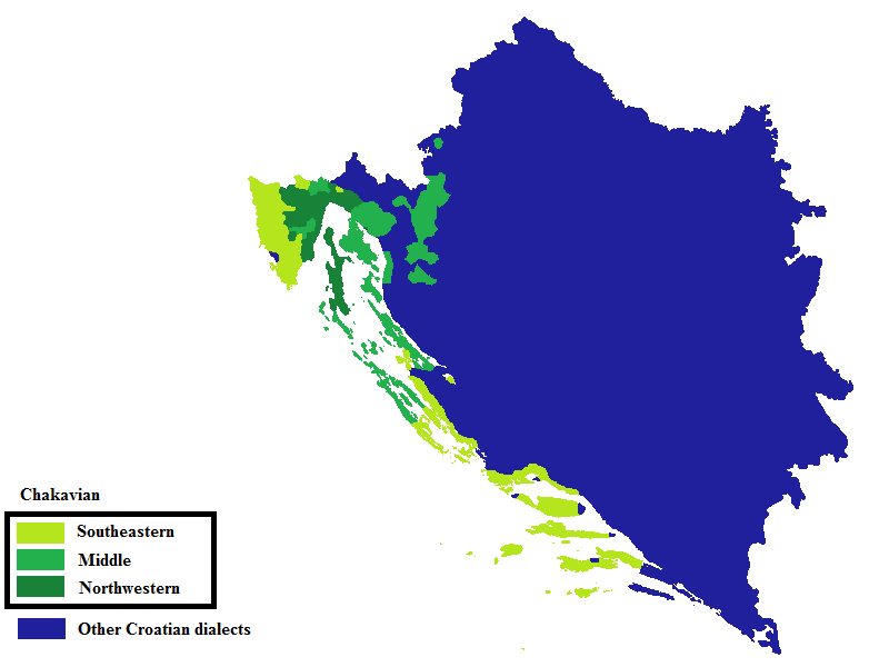 Skupine čakavskih dijalekata